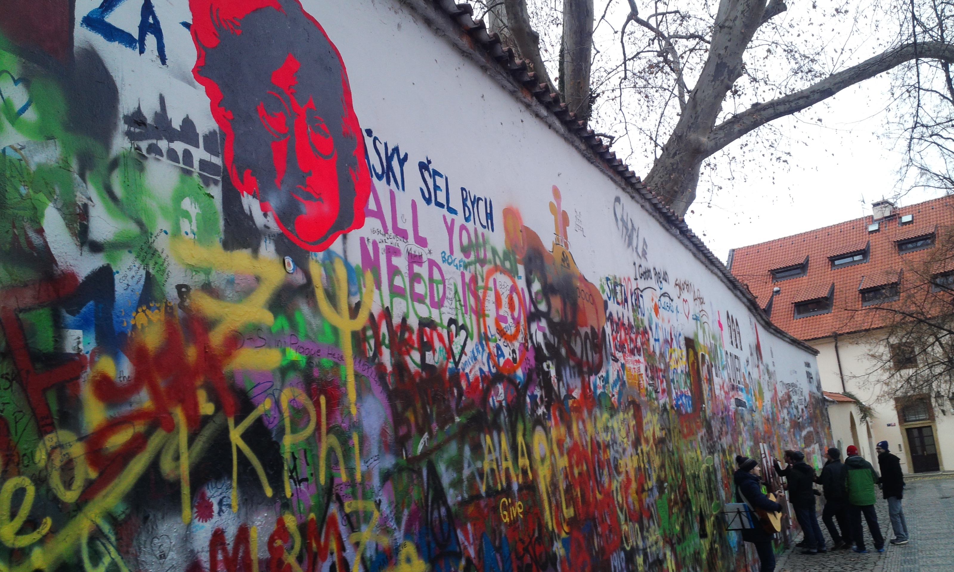 2015년 1월 24일 프라하 존 레논의 벽